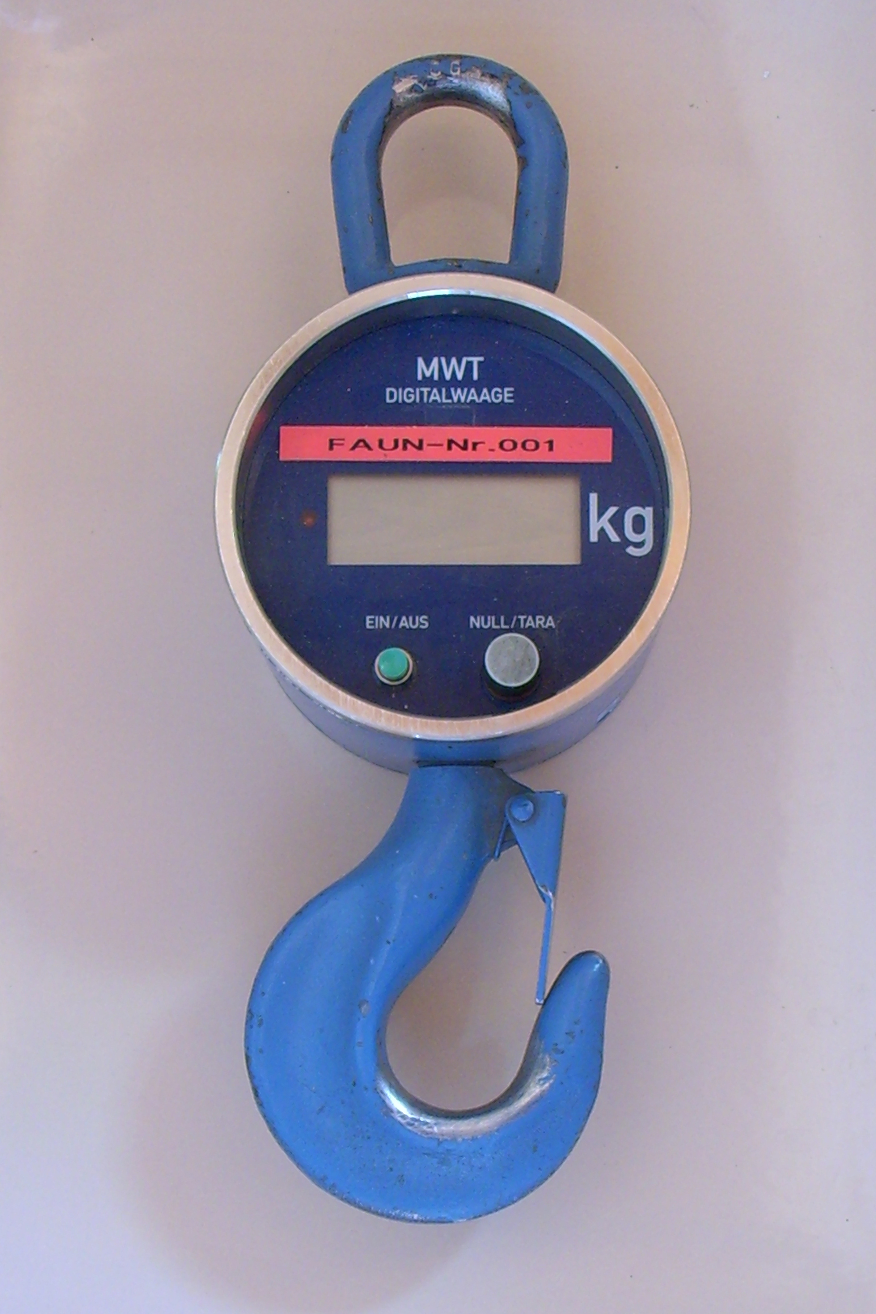 Ringwaage der Fa. MWT, Messbereich 2000 kg, Anzeige elektronisch